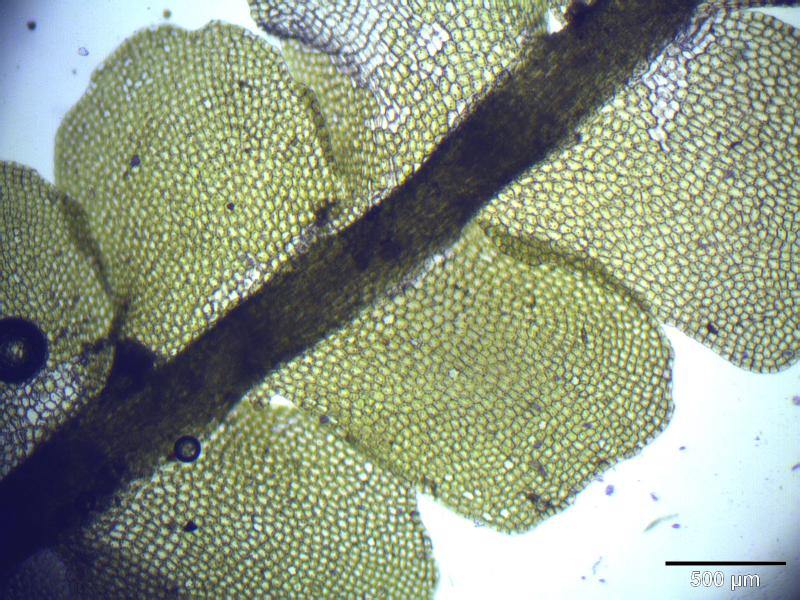 Bleiches Lippenbechermoos (Chiloscyphus pallescens), Habitus, Vergrößerung: 40x